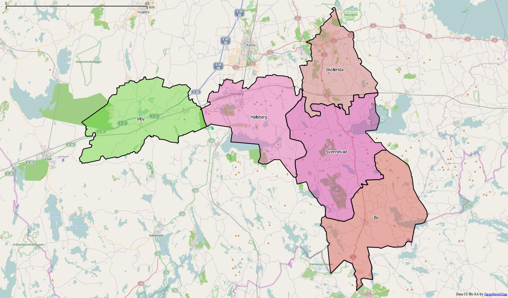 Distriktsindelningen i Hallsbergs kommun